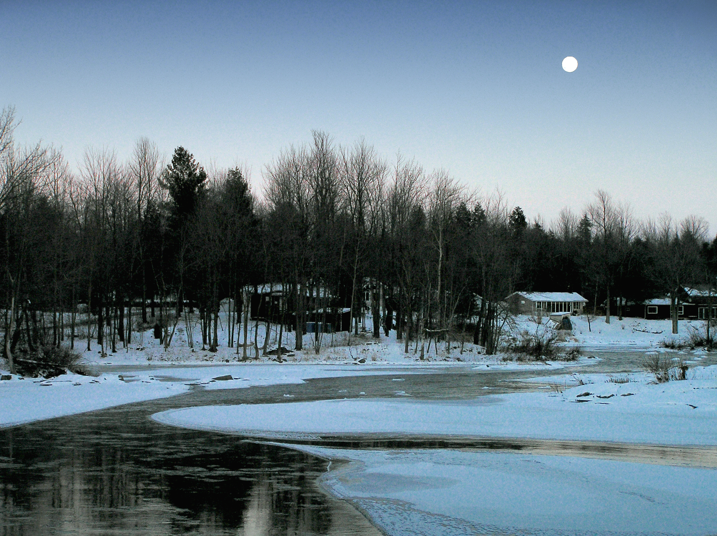 Brigham (Québec) - La rivière Yamaska en aval du pont couvert Balthazar (Déc-2005)